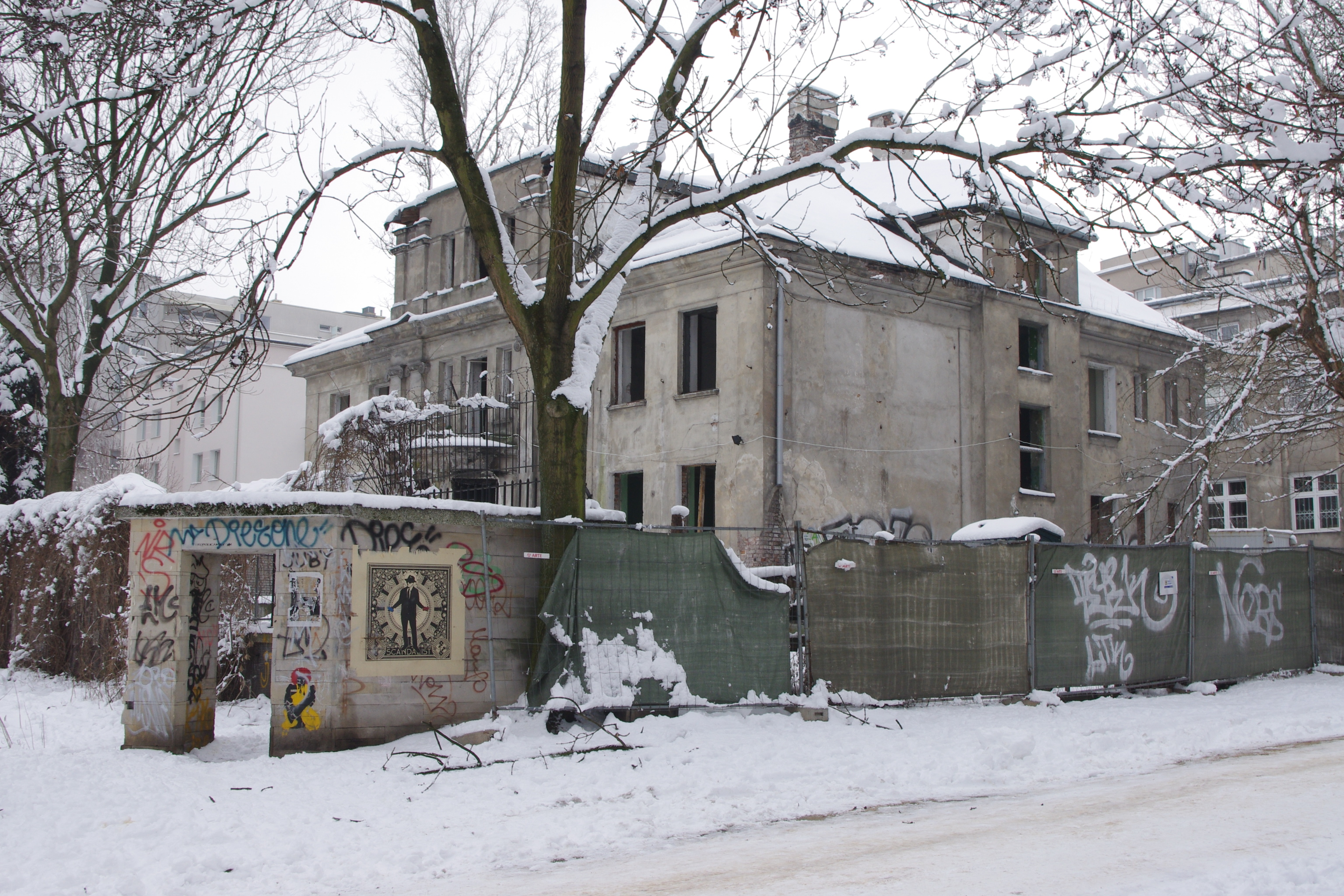 Willa przemysłowca kuśnierskiego Arpada Chowańczaka (Arpad Chowańczak) przy ul. Morskie Oko 5 w Warszawie – powstała w 1928 r., położona na warszawskim Starym Mokotowie. Od 2010 r., w rejestrze zabytków.